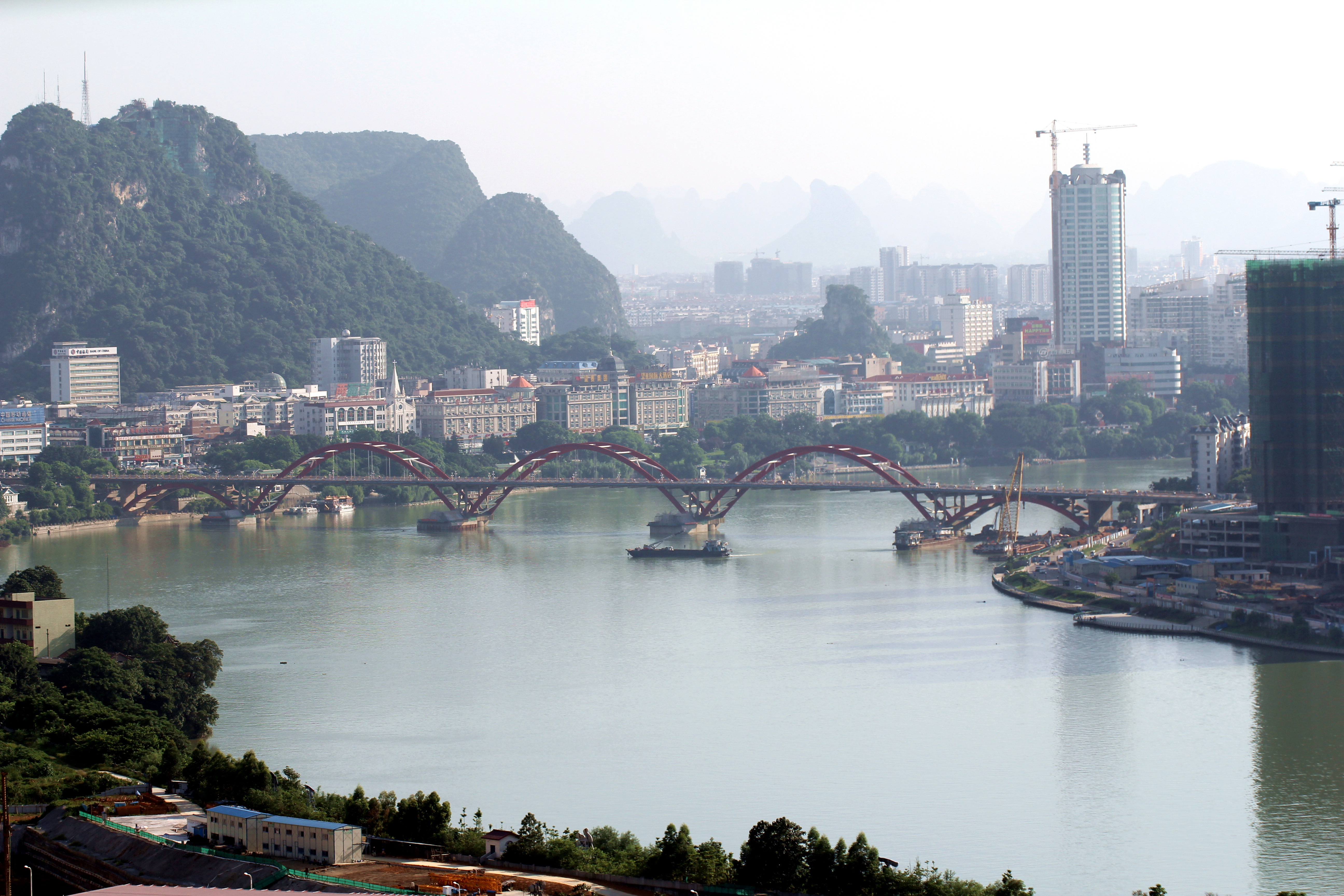 柳州文惠桥